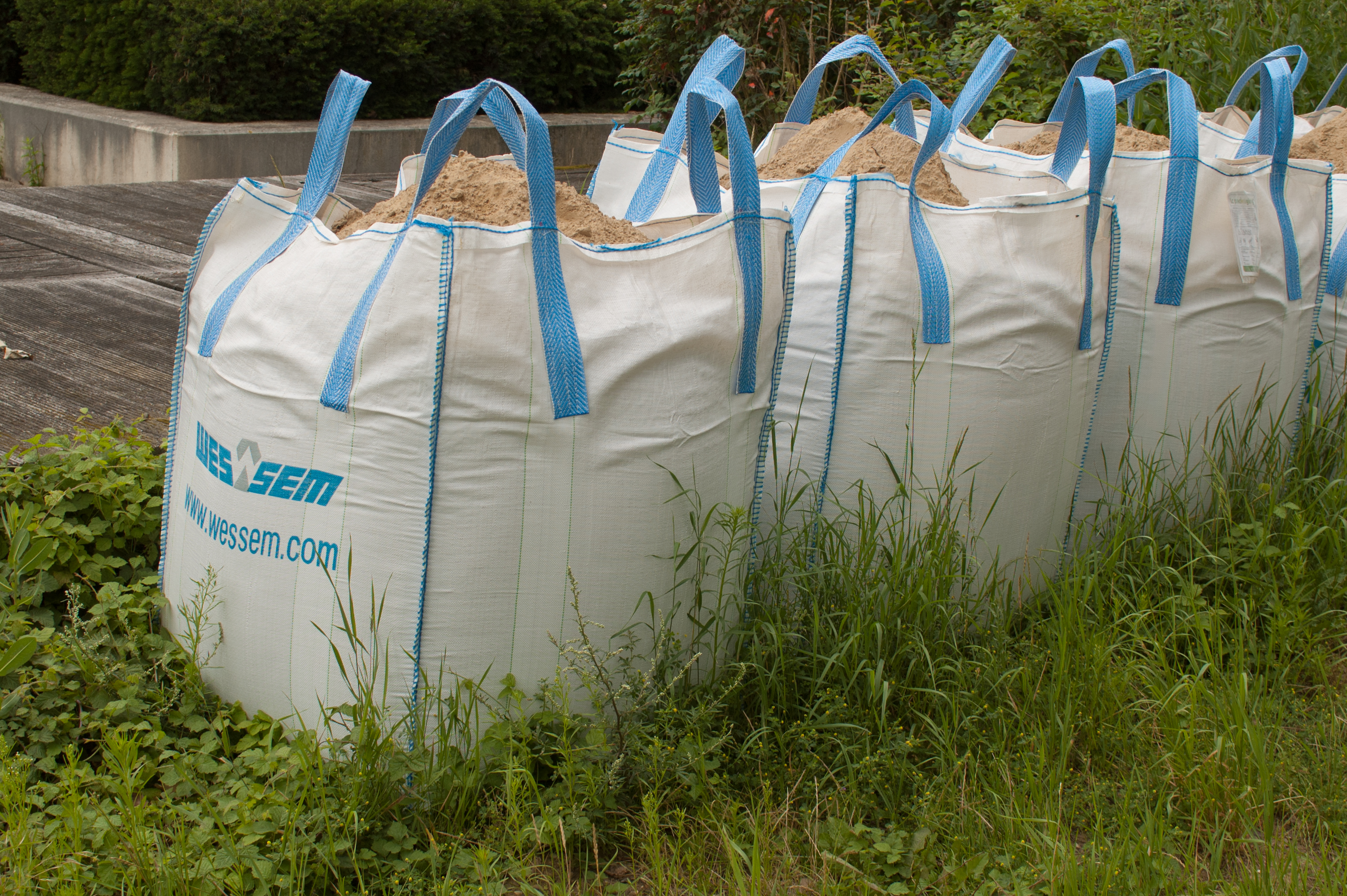 Mit Sand befüllte Bigbags auf einer Baustelle am Wasserkraftwerk Linne, Niederlande